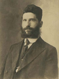 Rabbi Eliezer Silver in his younger years